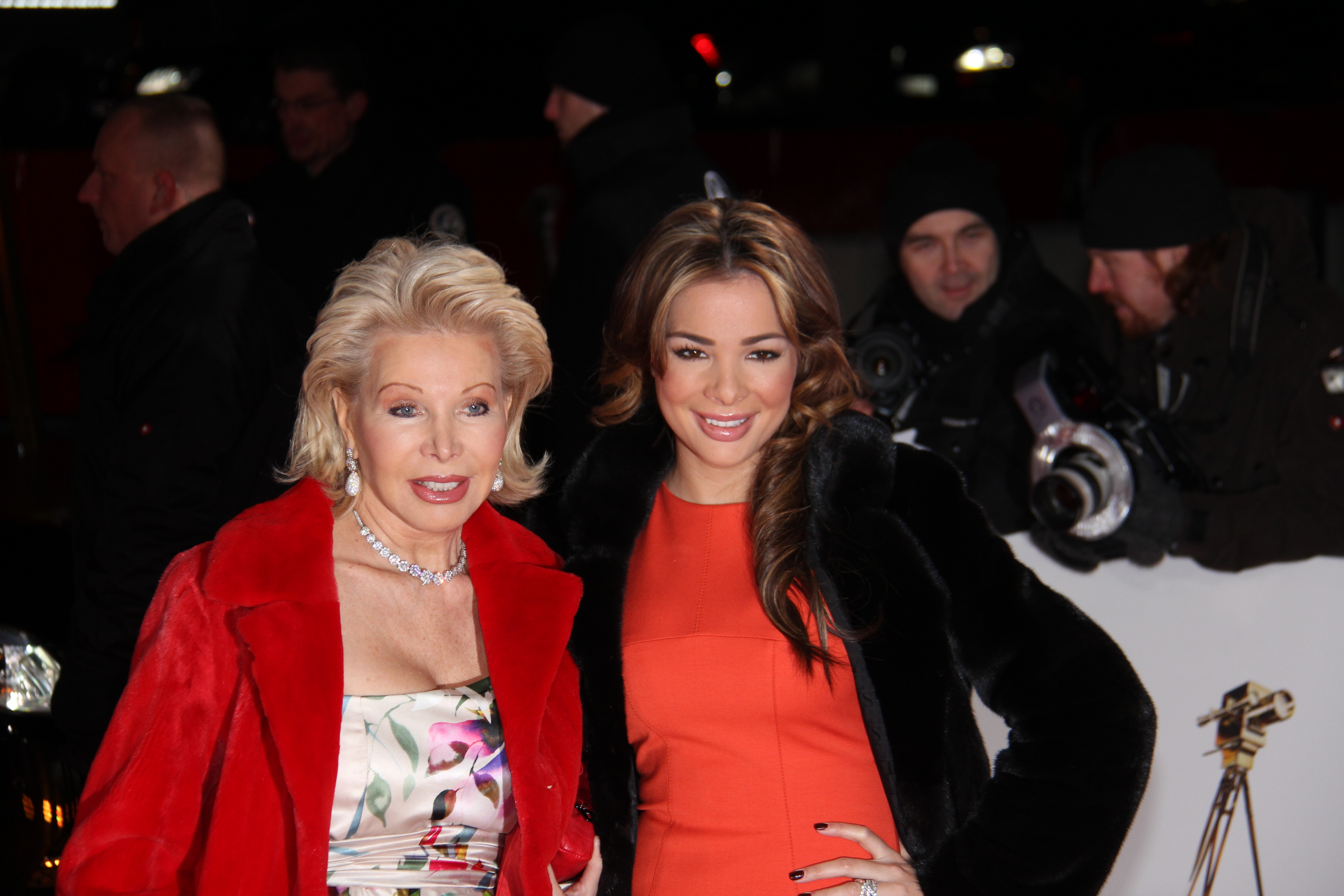 Ute-Henriette Ohoven und Tochter Chiara bei der Goldenen Kamera 2012